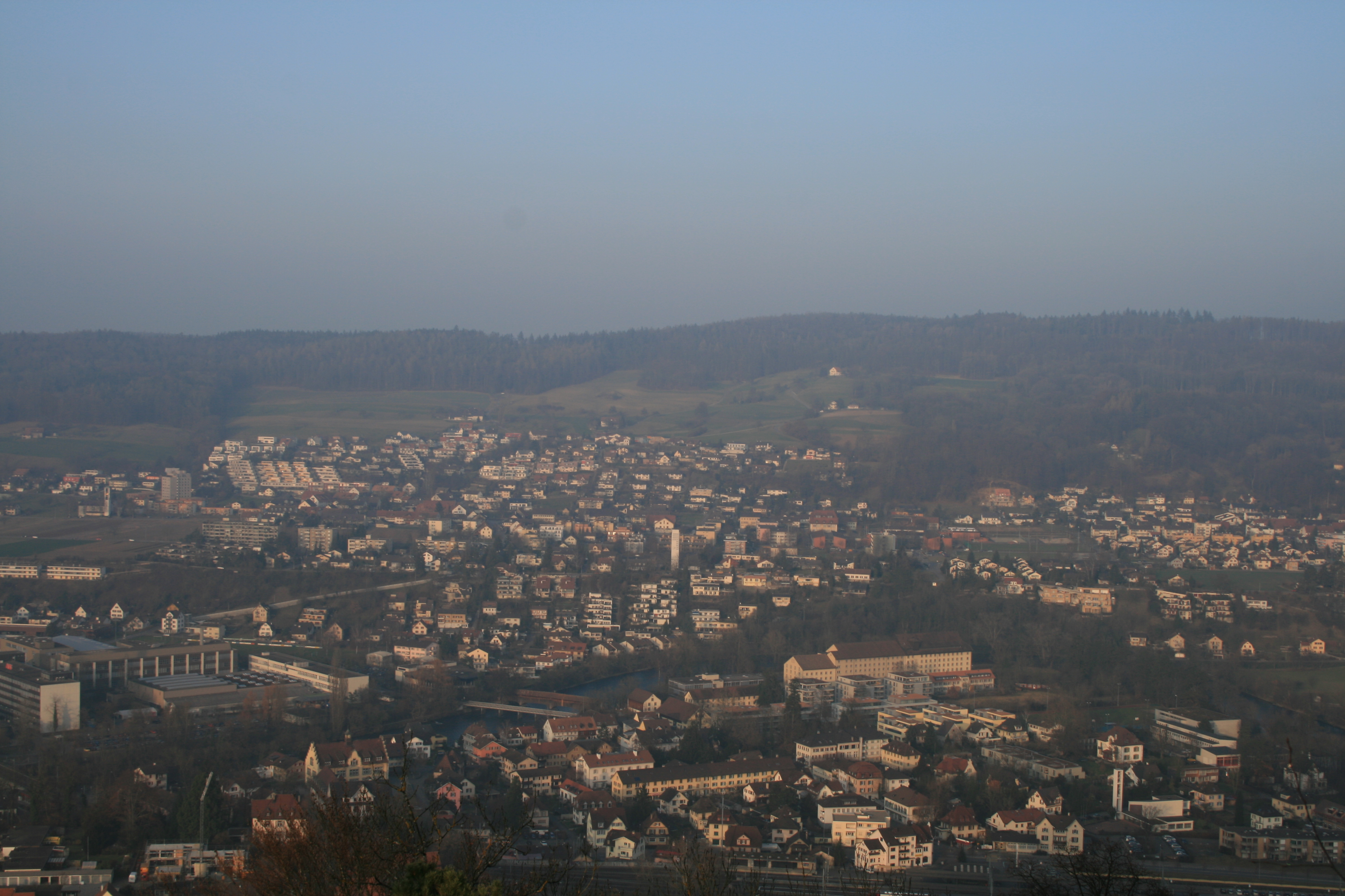 Blick auf Untersiggenthal und Turgi